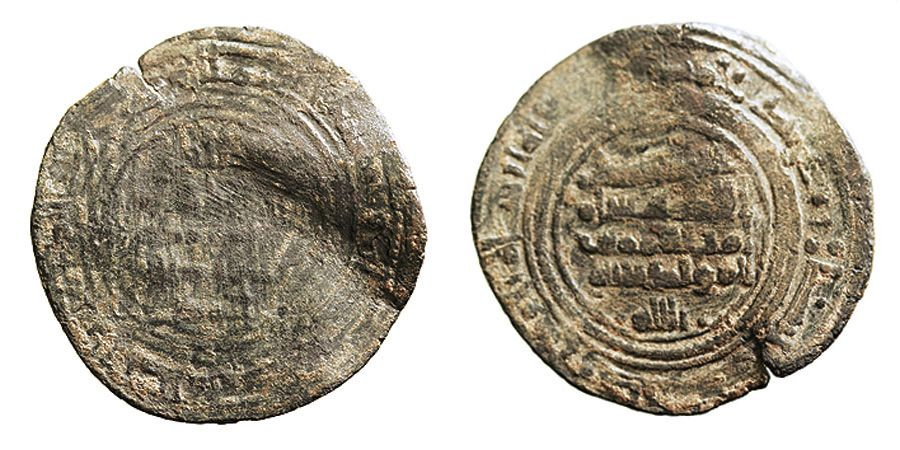 Dírham de vellón (no de plata, como sería lo habitual) emitido por el reino taifa de Sevilla bajo Al-Mutadid. Acuñada el año 439 de la Hégira. Alabeada.